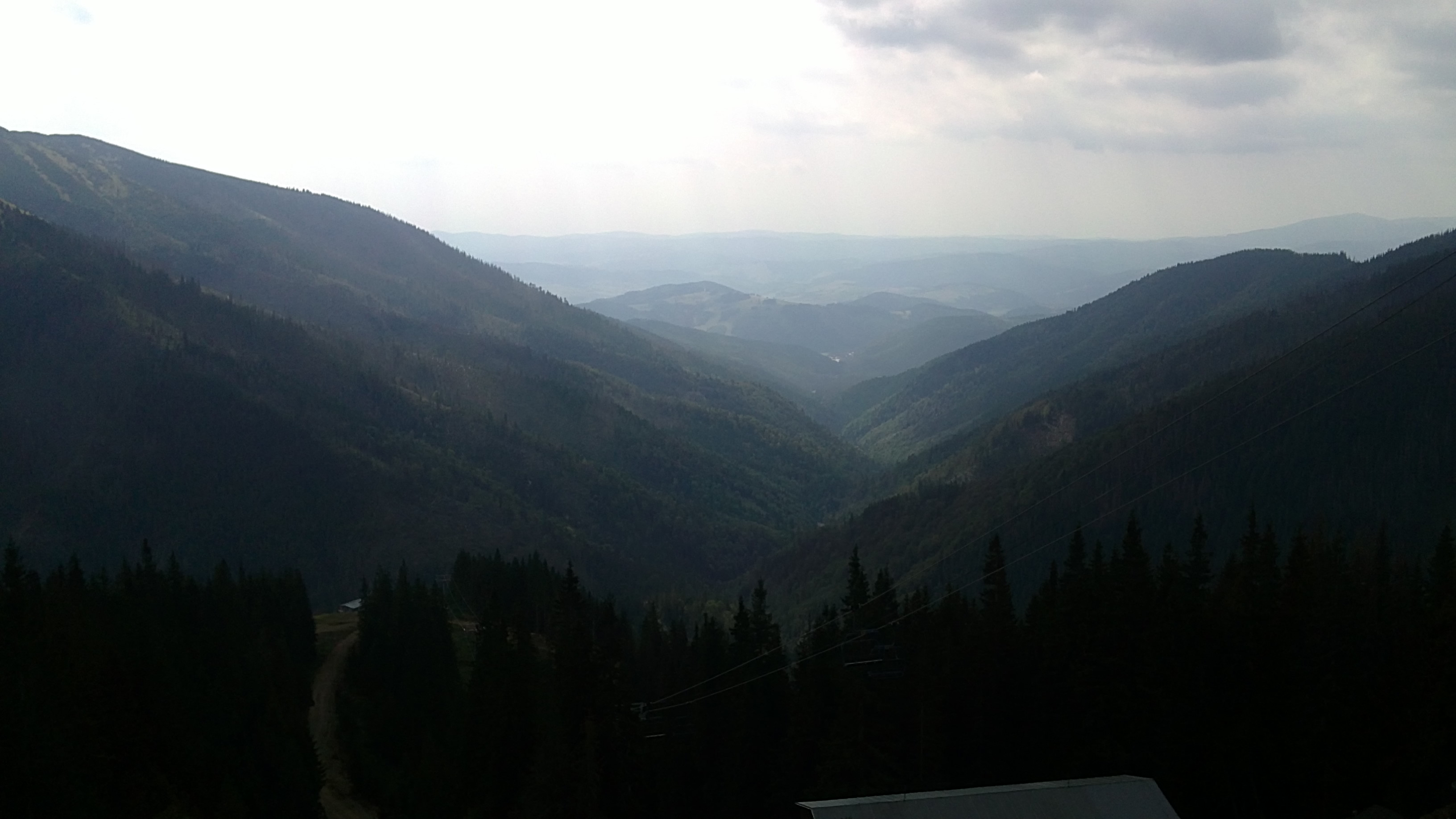 Pohlad zo severu